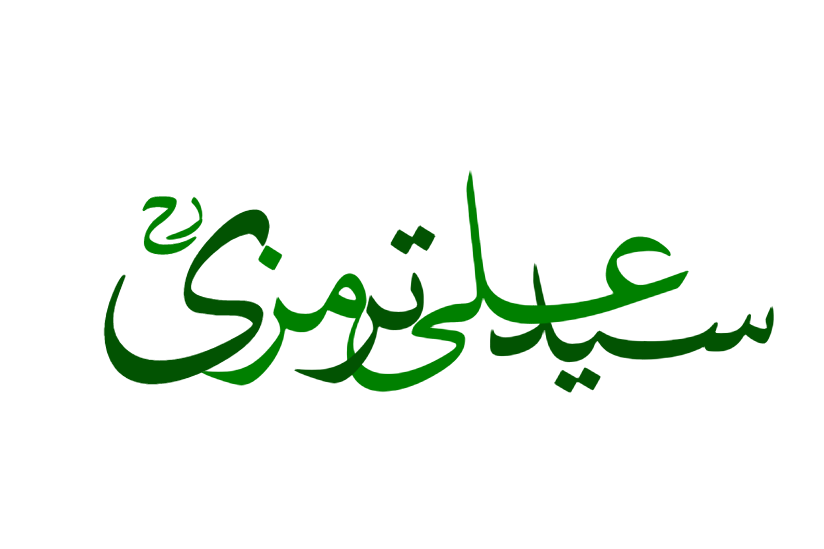 علی ترمیزی